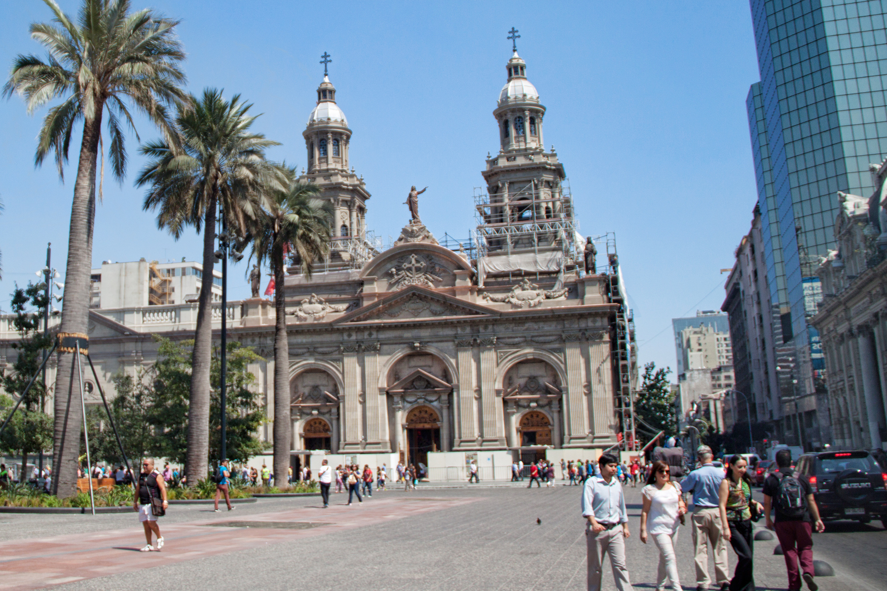 Santiago, Chile